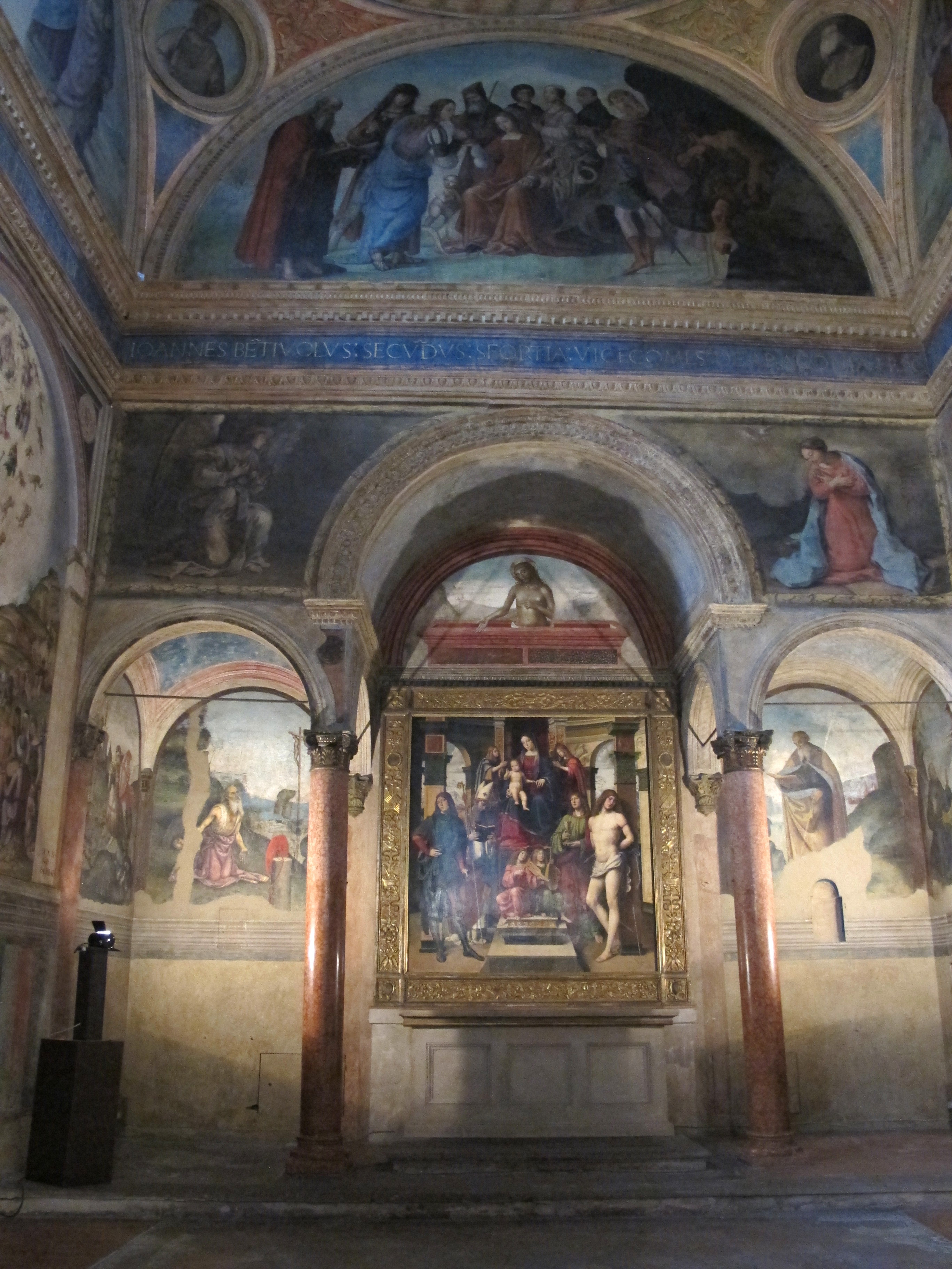 San Giacomo Maggiore (Bologna)